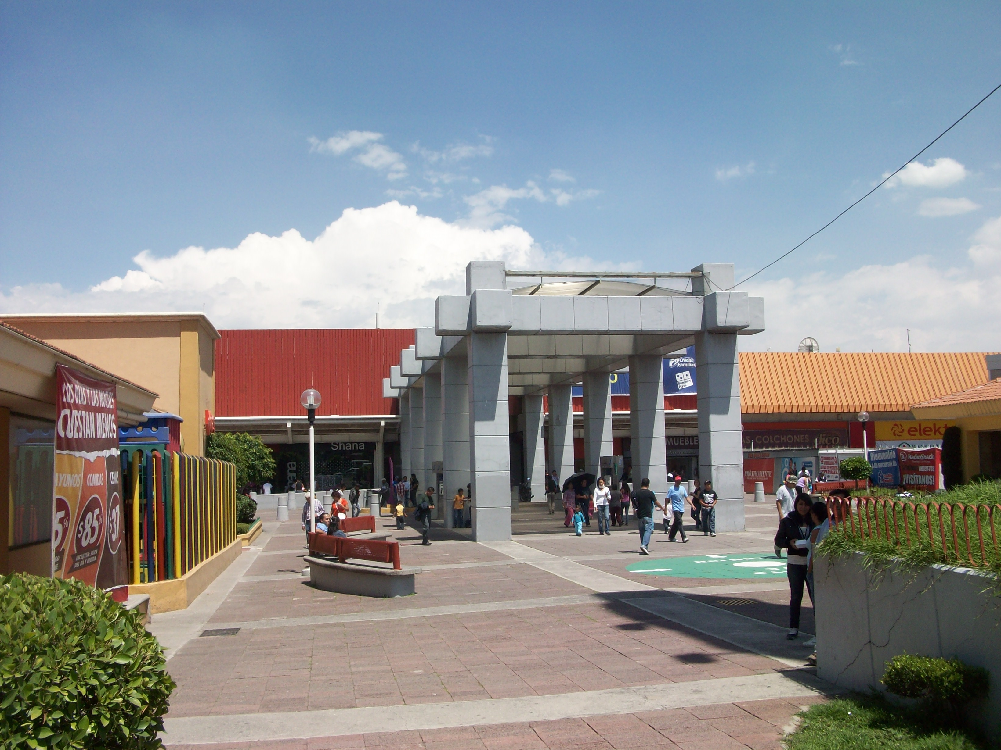 Acceso a Plaza Aragon